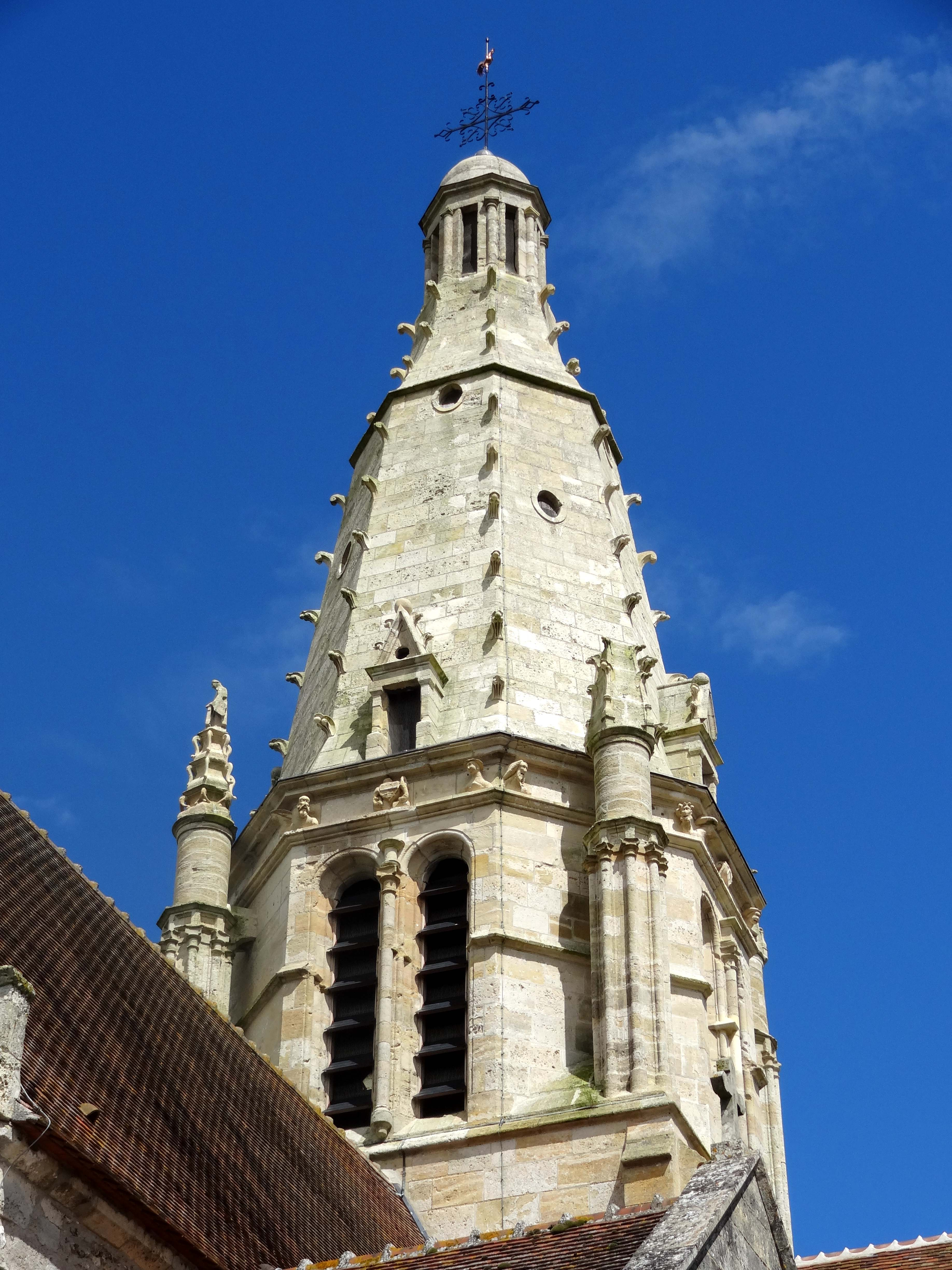 Église Saint-Crépin-et-Saint-Crépinien de Saint-Crépin-Ibouvillers - voir titre.